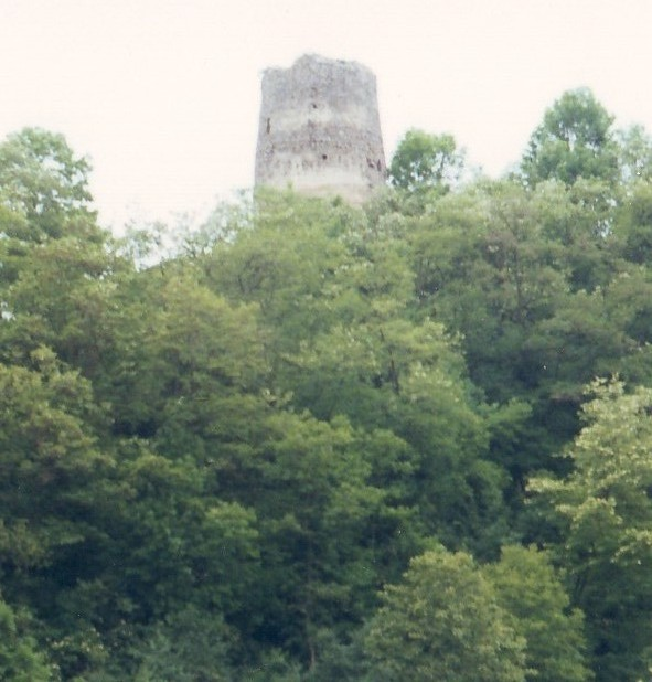 Sebesvár vára (Erdély)